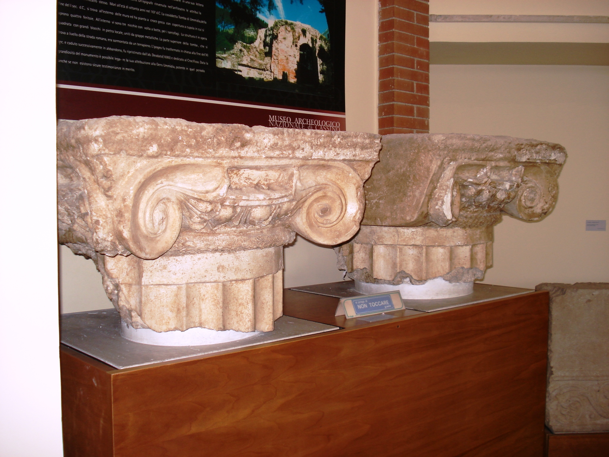 Capitelli rinvenuti presso il mausoleo di Ummidia Quadratilla, conservati presso il Museo Nazionale Archeologico G. Carettoni di Cassino (seconda metà del II secolo a. C.)